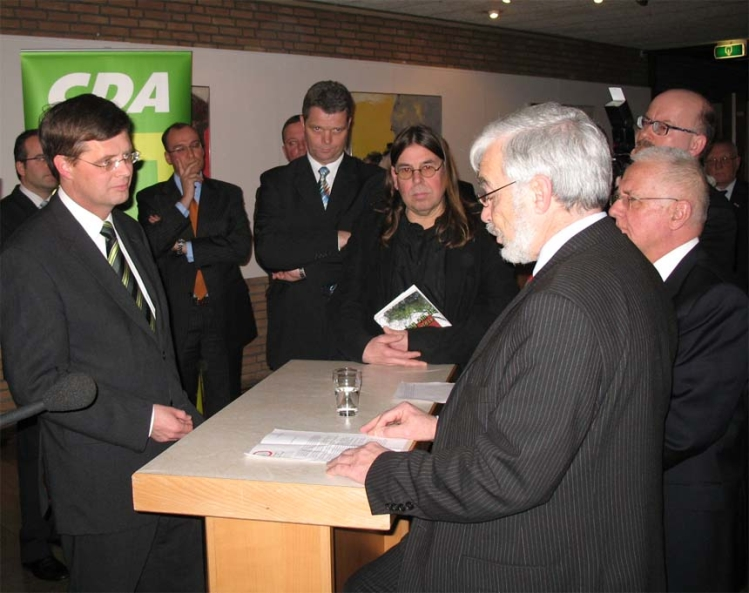 Afgevaardigden van de Vereniging STOP awacs praten met minister-president Balkenende